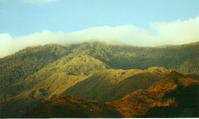 Fila Palmarito haciendo conexión con el parque nacional Henri Pittier y el Pico Palmarito en el frente.